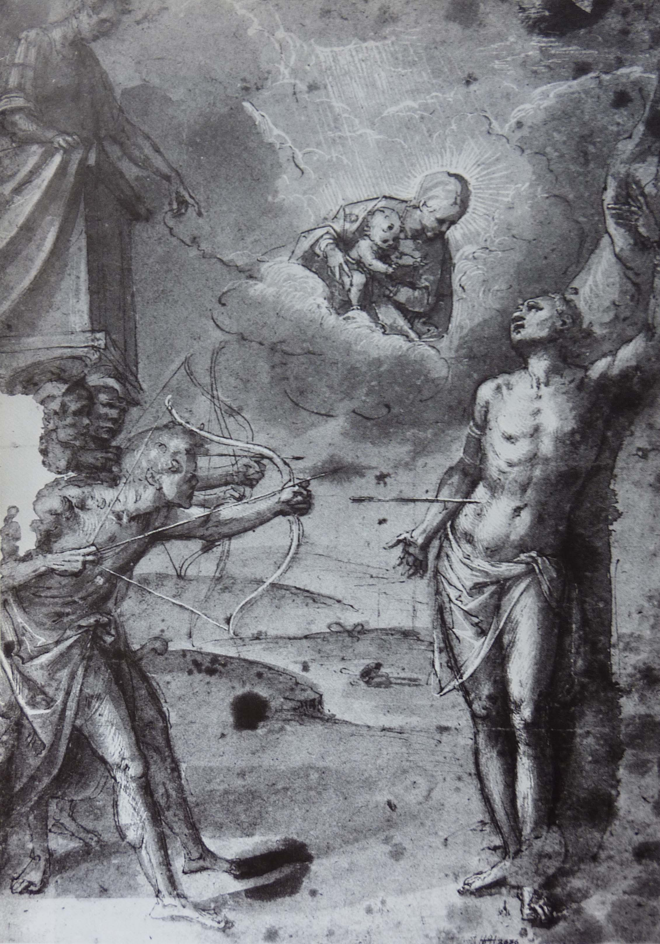 Martyre de S. Sébastien, par Fernão Gomes, dessin préparatoire